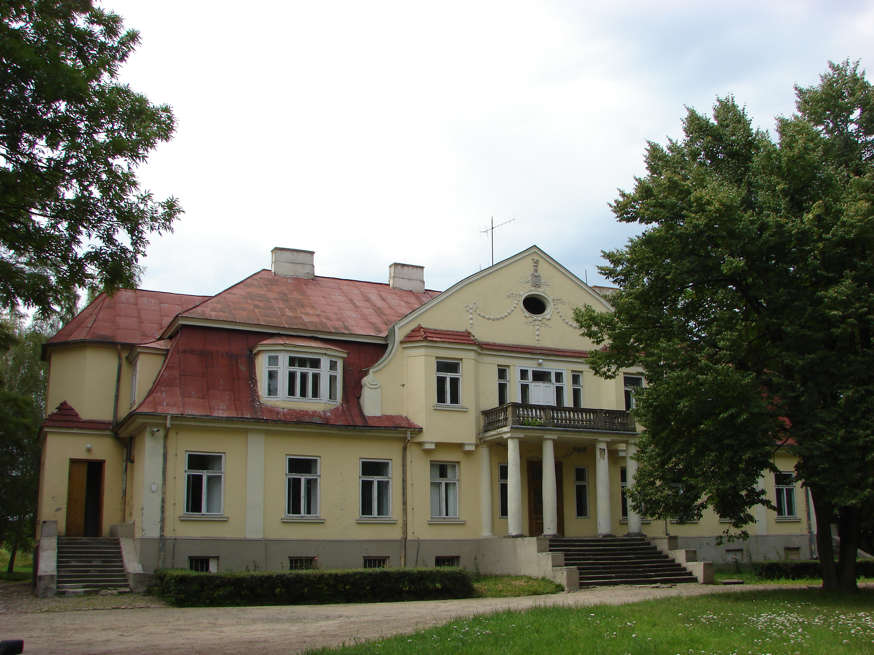 Ktery, zespół pałacowy, poł. XIX